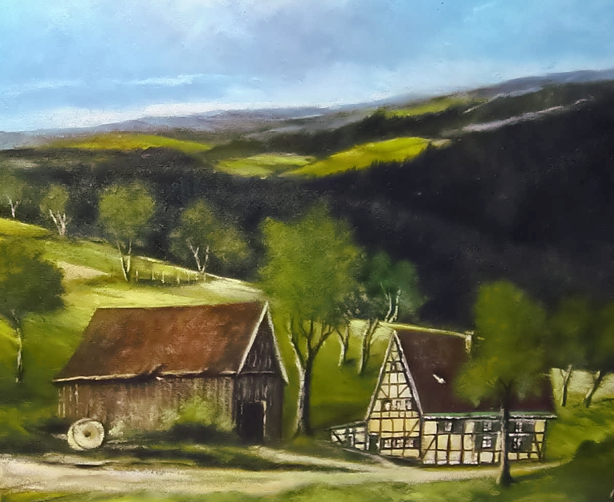 Ausschnitt aus einem Ölgemälde der Wirtsmühle